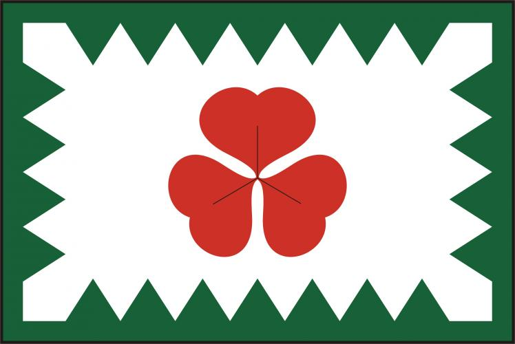 vlajka, Kopřivná, okres Šumperk